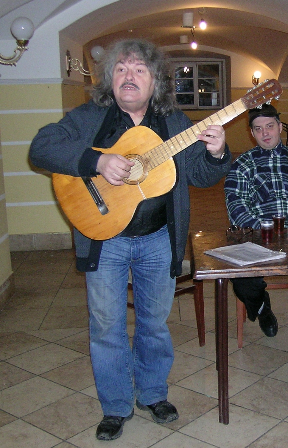 Александр Николаевич Лобановский. Фотография с выступления в БХС СПБ